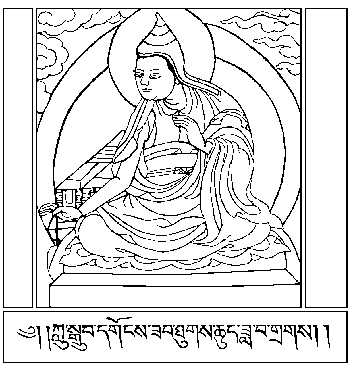 Hình được phép công bố của trang vi: ACIP Thể loại:Đồ tượng Phật giáo